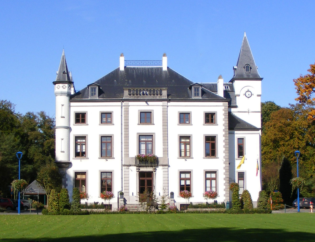 Maison Communale de Jurbise (Services administratifs)